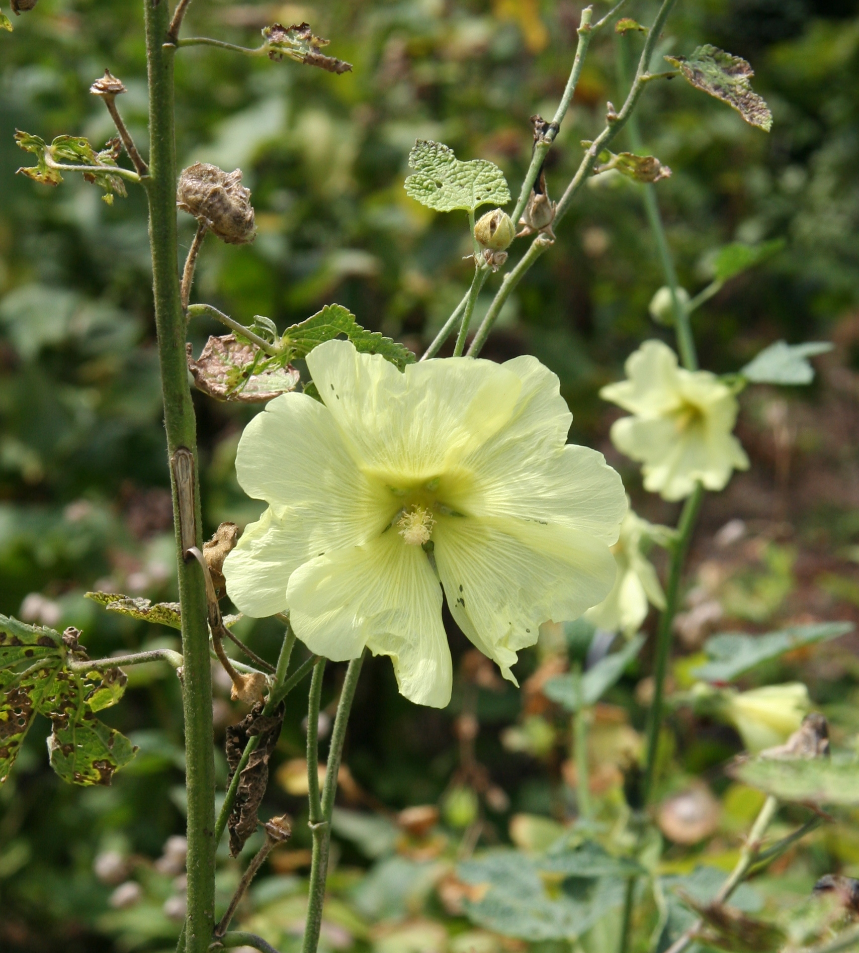 Alcea rugosa im Botanischen Garten Dresden